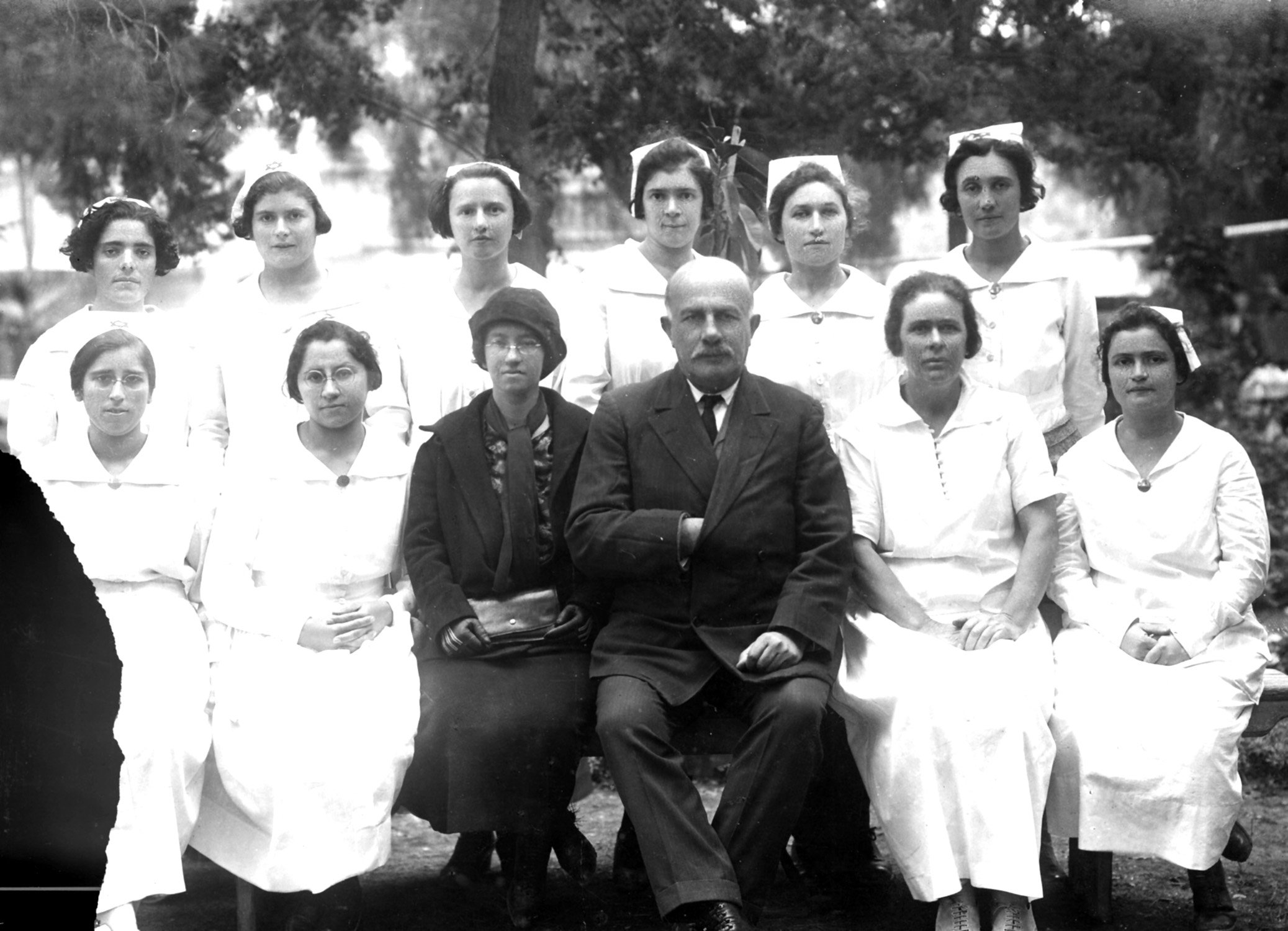 מנהל ביה"ח רוטשלילד בירושלים ד"ר זלקינד עם נלי שטראוס מראשי תנועת הנשים בא"י